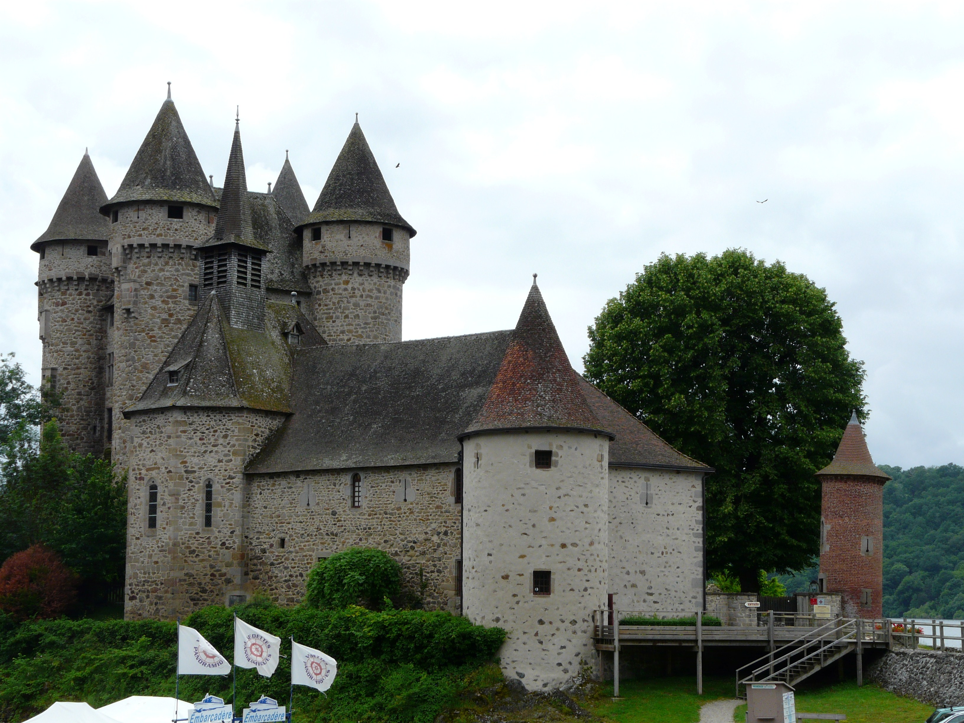 Le château de Val à Lanobre, Cantal, France.